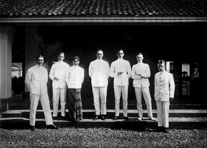 Foto. Groepsportret van de assistent-resident, regent en controleurs van Malang.